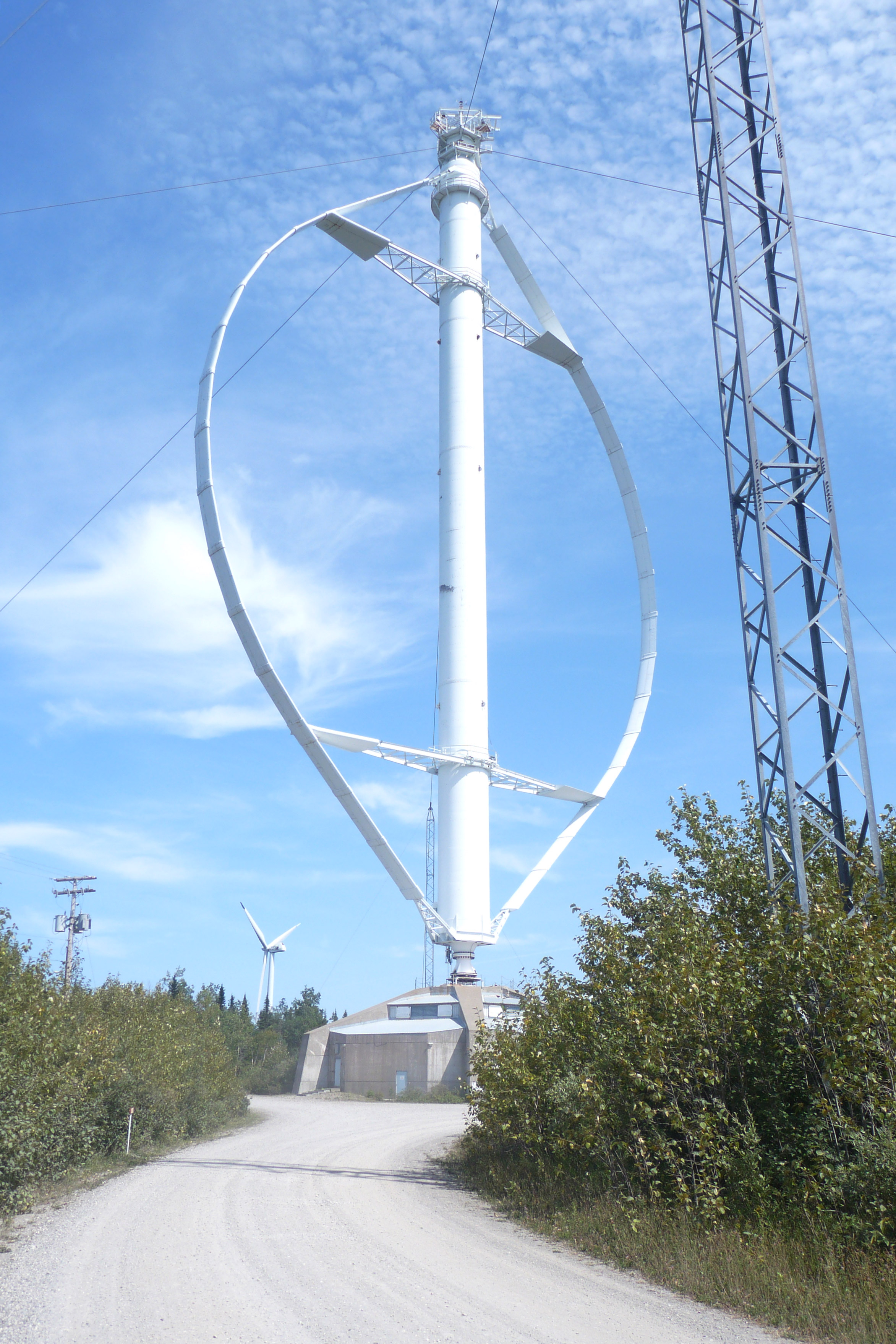 Éole à Cap-Chat en 2010 (éolienne verticale et centre d'interprétation)